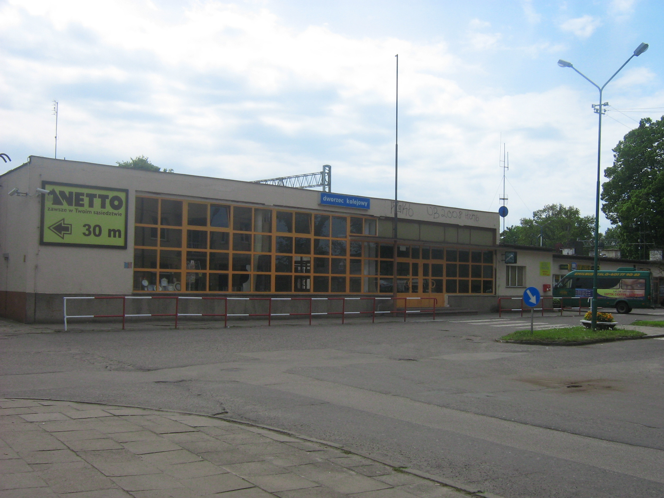 Kamień Pomorski (stacja kolejowa)